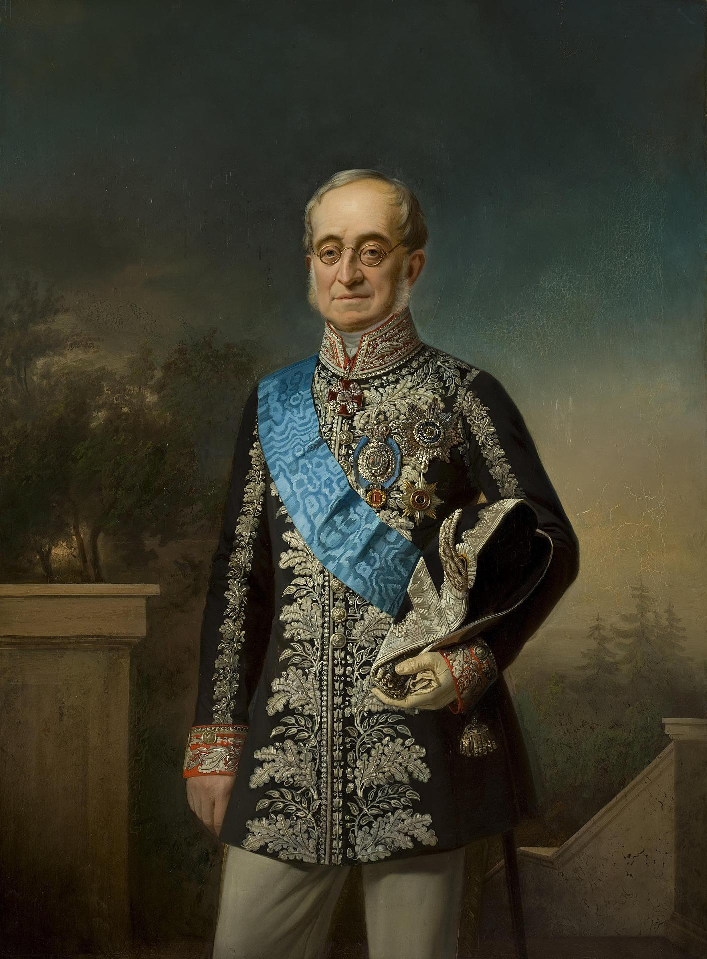 Портрет графа Карла Васильевича Нессельроде